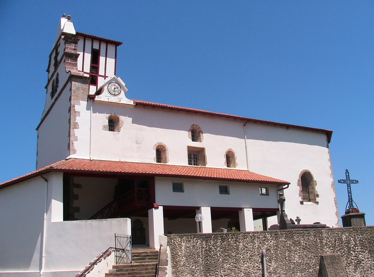 Église de Macaye